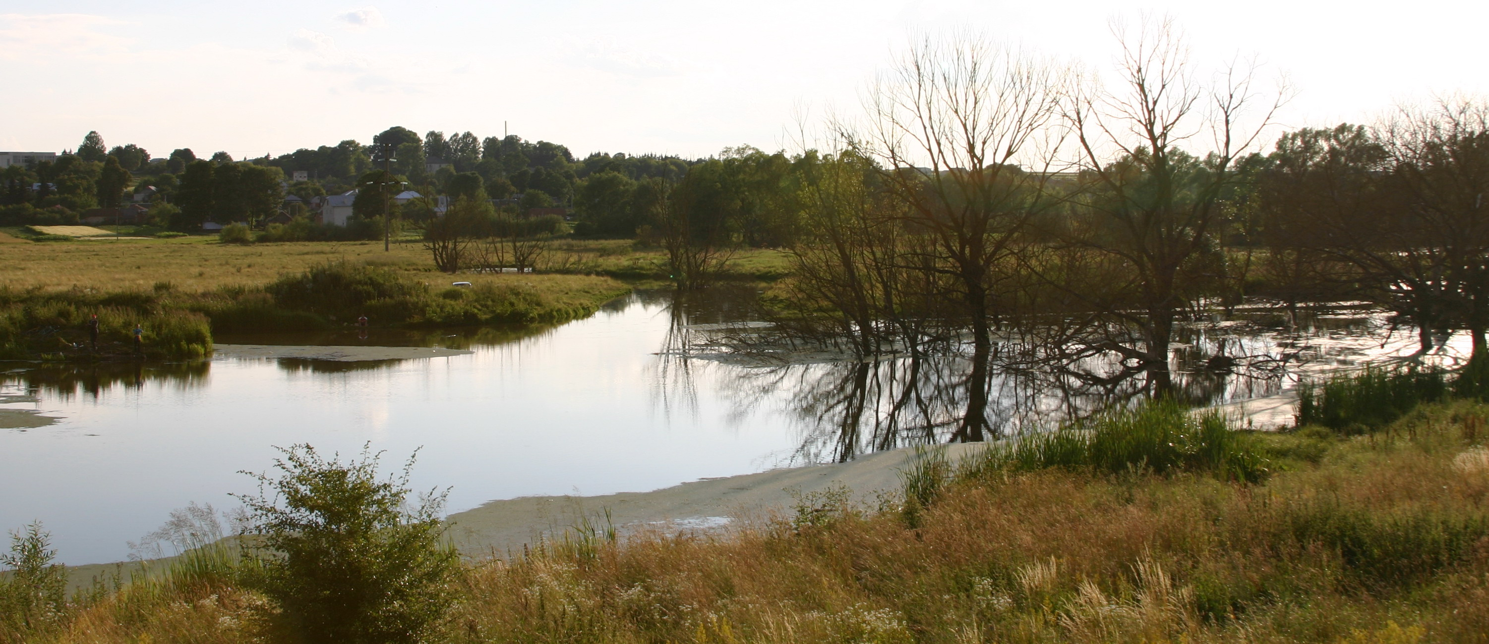 Місце злуки річки Гніздечної із Гнізною на межі смт Великі Бірки і с. Дичків